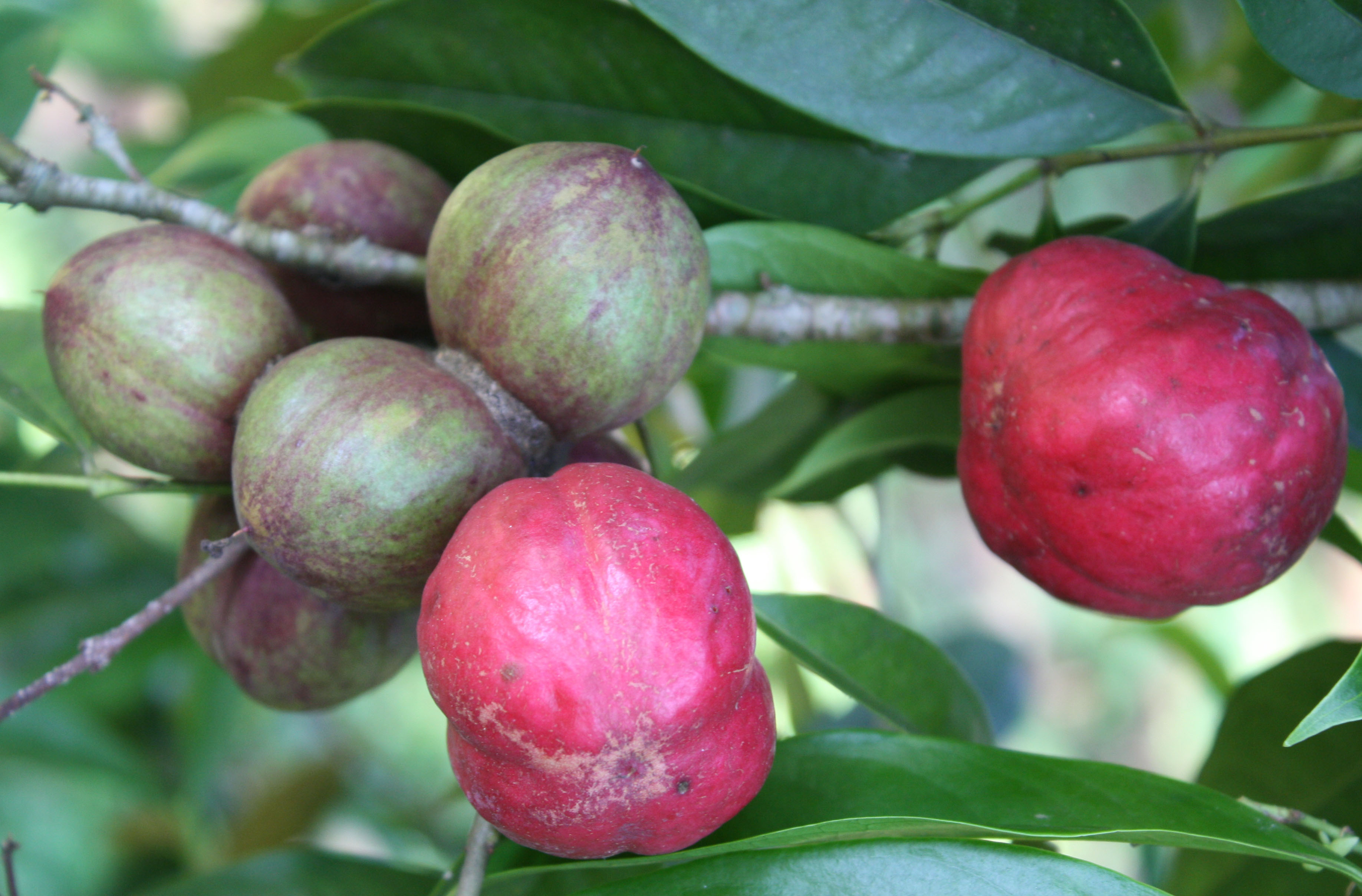 Mahkota dewa salah satu golongan buah yang bisa dipakai untuk obat